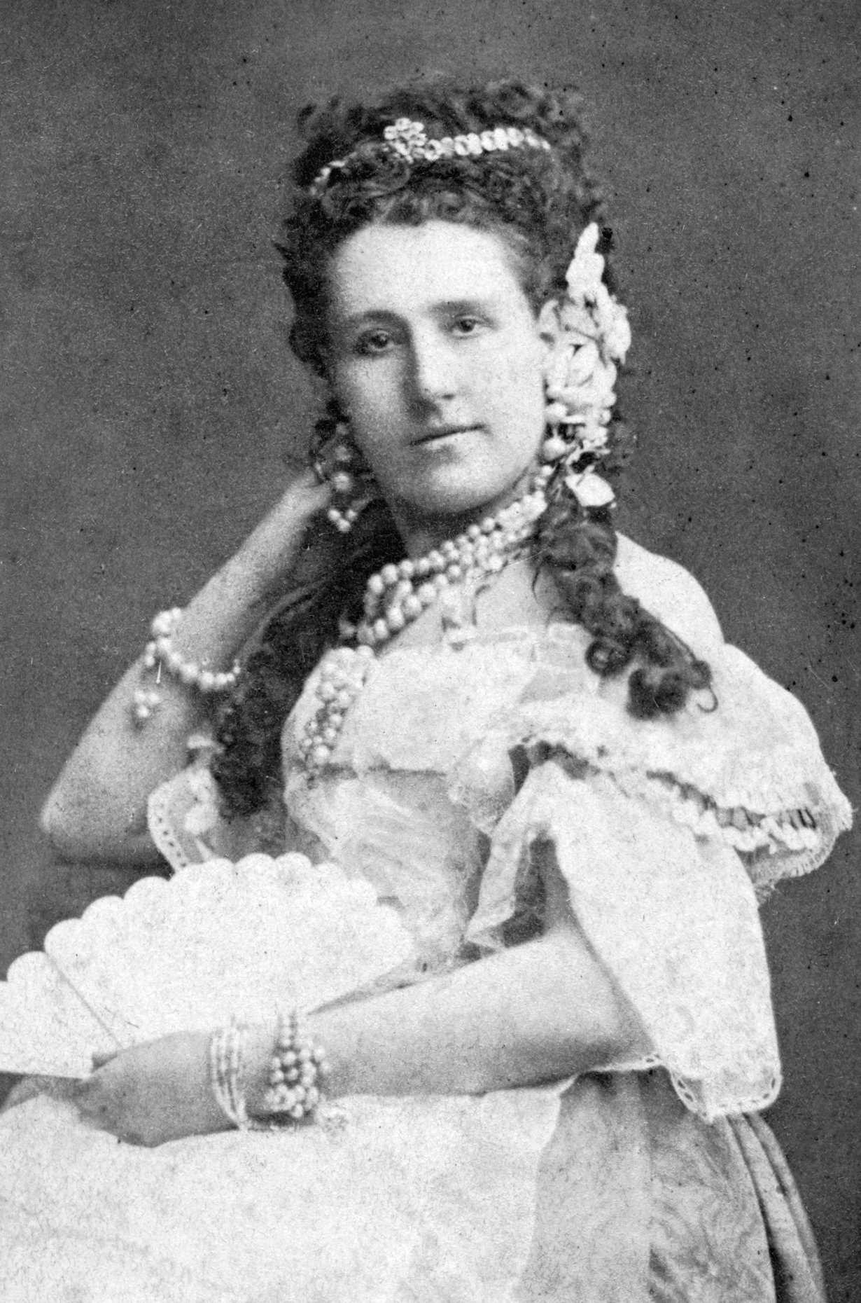 Hildur Carlberg, skådespelare vid Novander & Carlbergs sällskap 1870-71